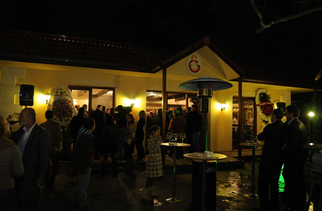 Galatasaray Maslak Nevzat Özgörkey Tesisleri